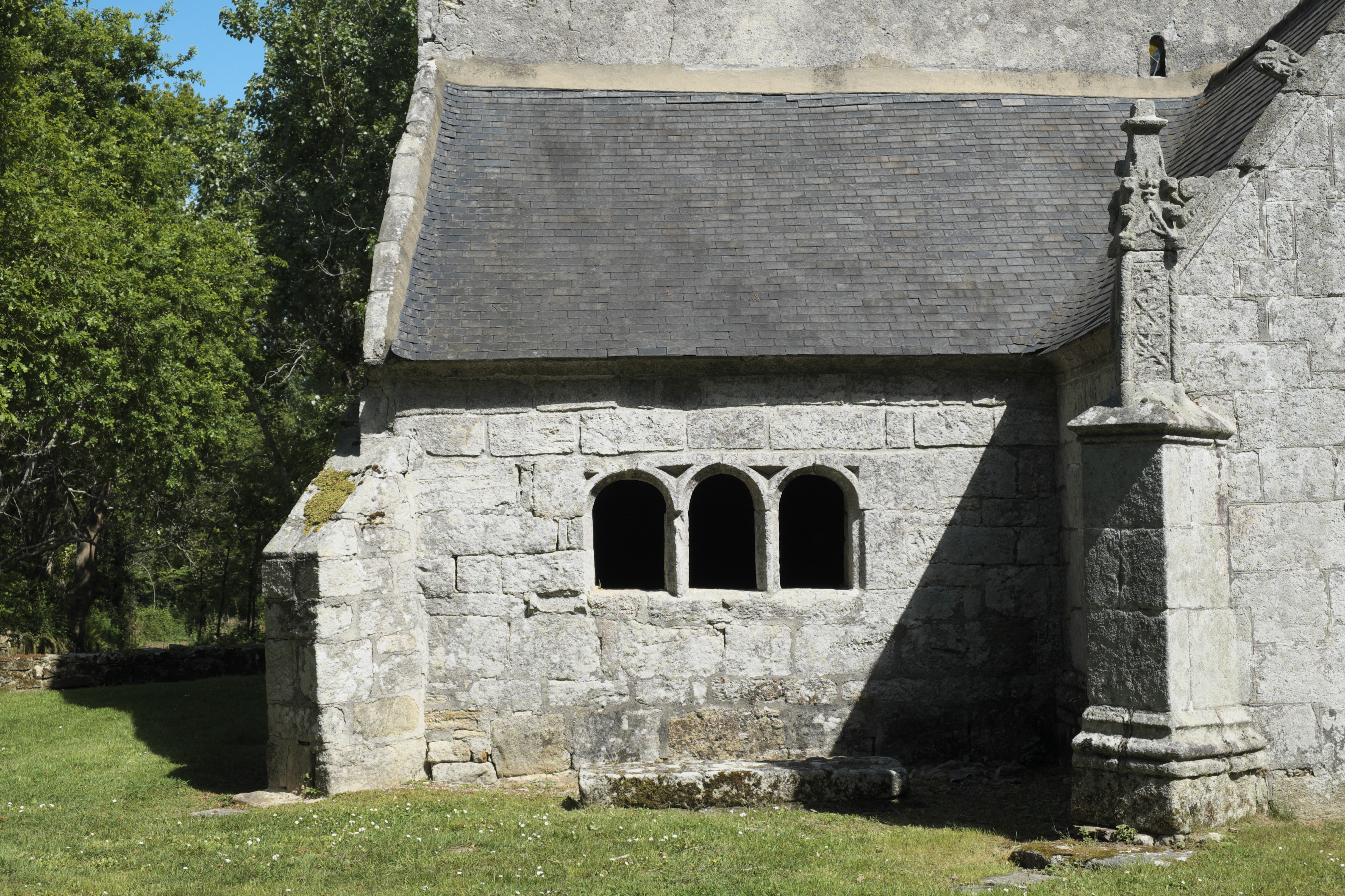 Chapelle de Perguet in Bénodet im Département Finistère (Region Bretagne/Frankreich)